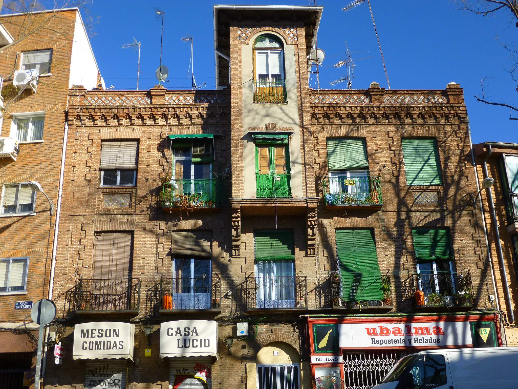 Barrio de Buenavista, distrito de Carabanchel, Madrid